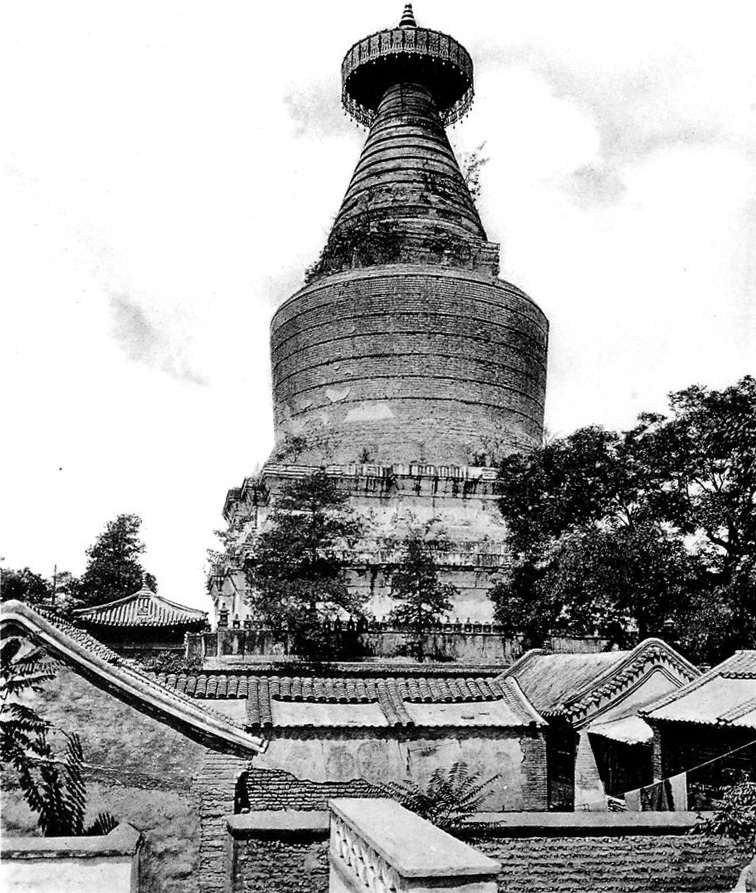 photo from Ein Tagebuch in Bildern